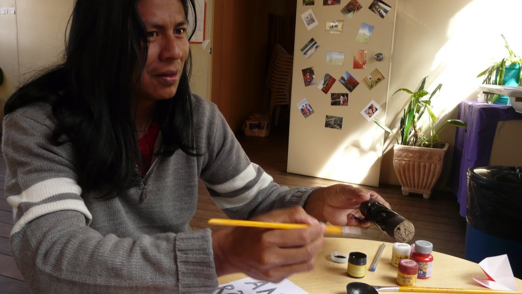 Künstlerischer Unterricht, auch mit traditionellen Kunstformen bildet den wesentlichen Teil der Organisation Monte Azul